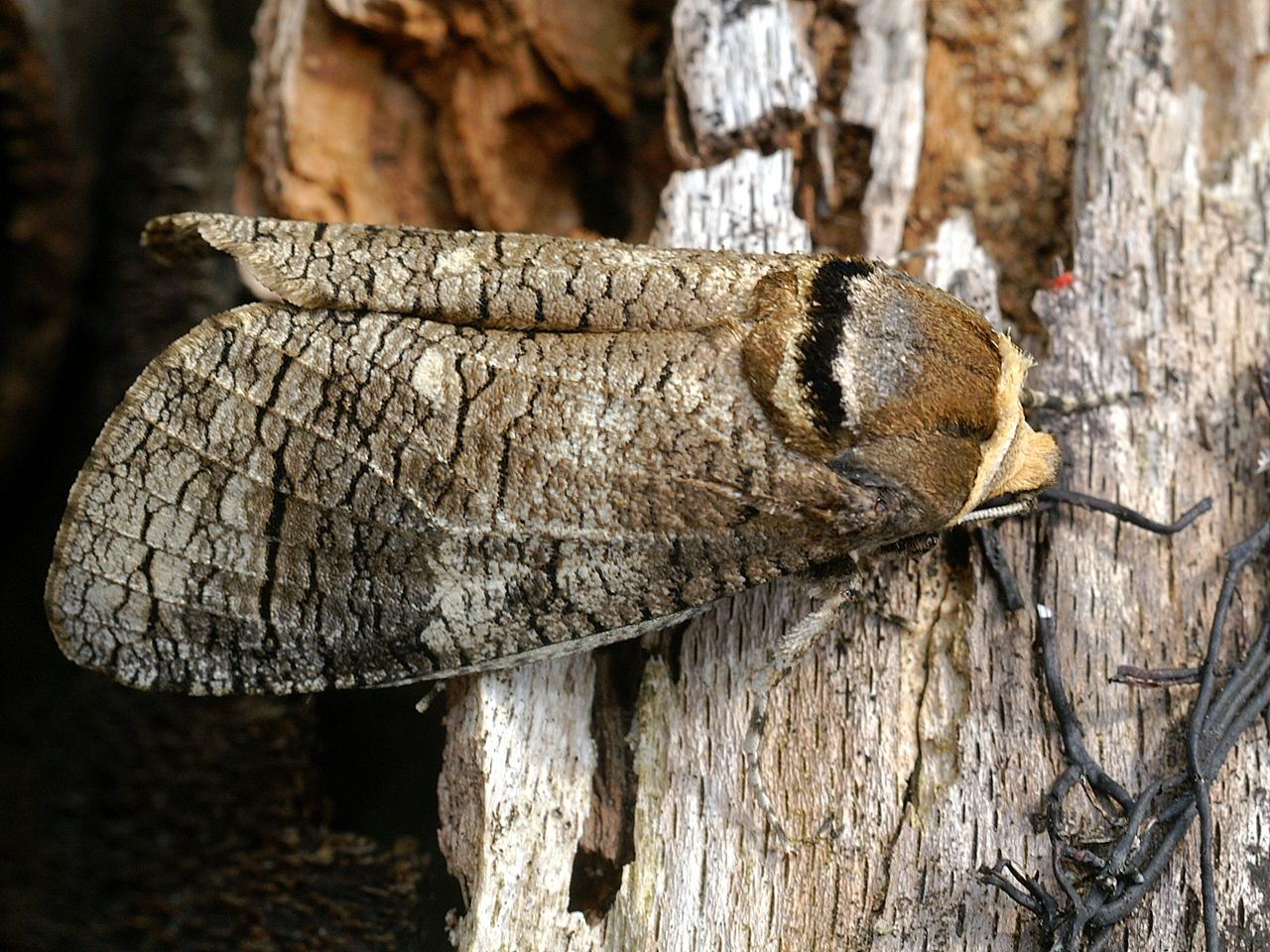 Cossus cossus